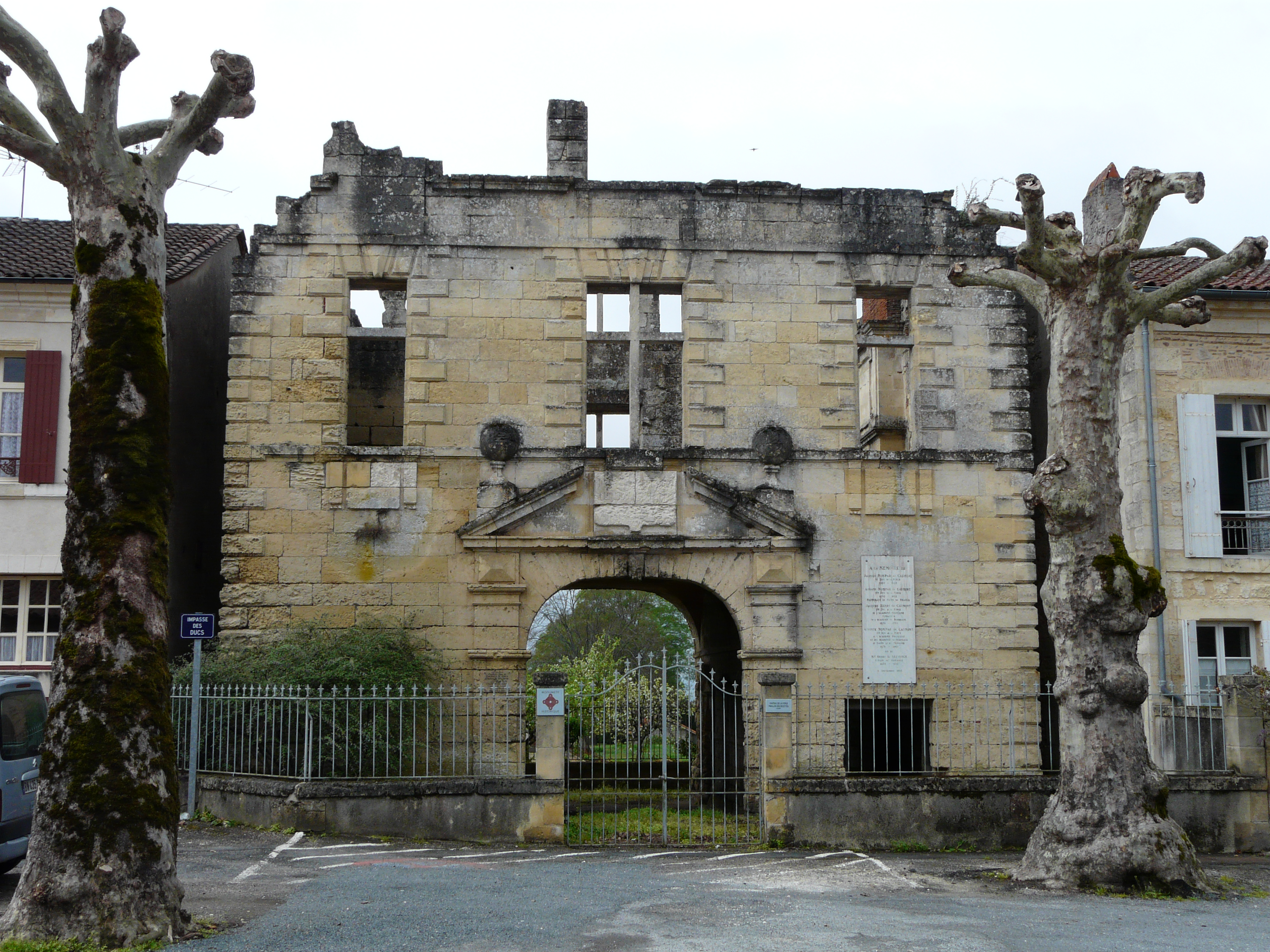 Vestiges du pavillon des recettes du château de La Force, Dordogne, France.